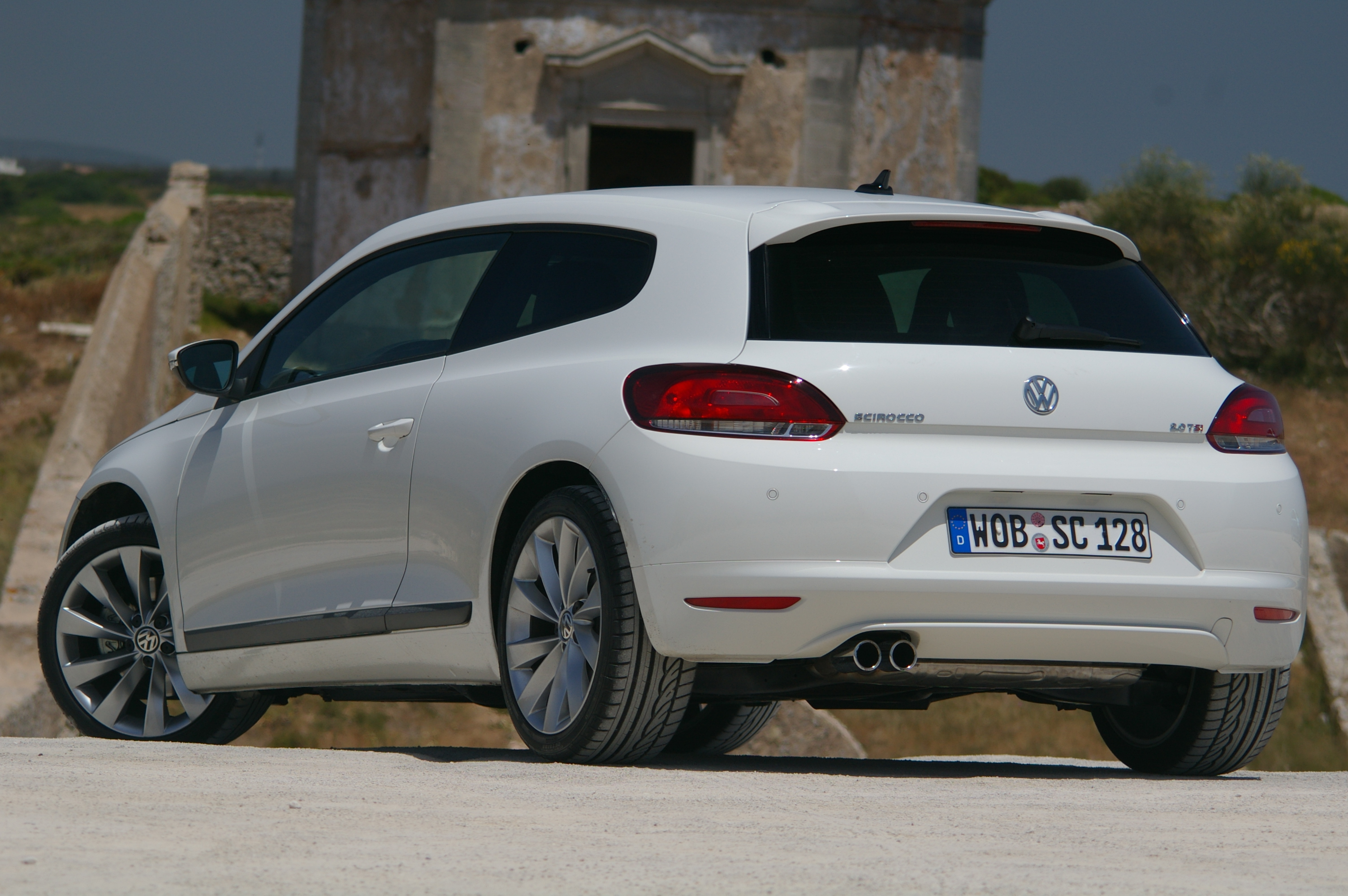 Volkswagen Scirocco 2008 67